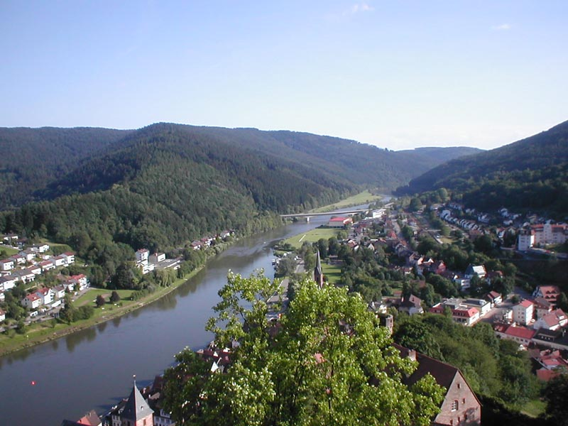 Blick von Burg Hirschhorn im nördlich des Neckars gelegenen Odenwald in den so genannten “Kleinen Odenwald“ südlich des Neckars